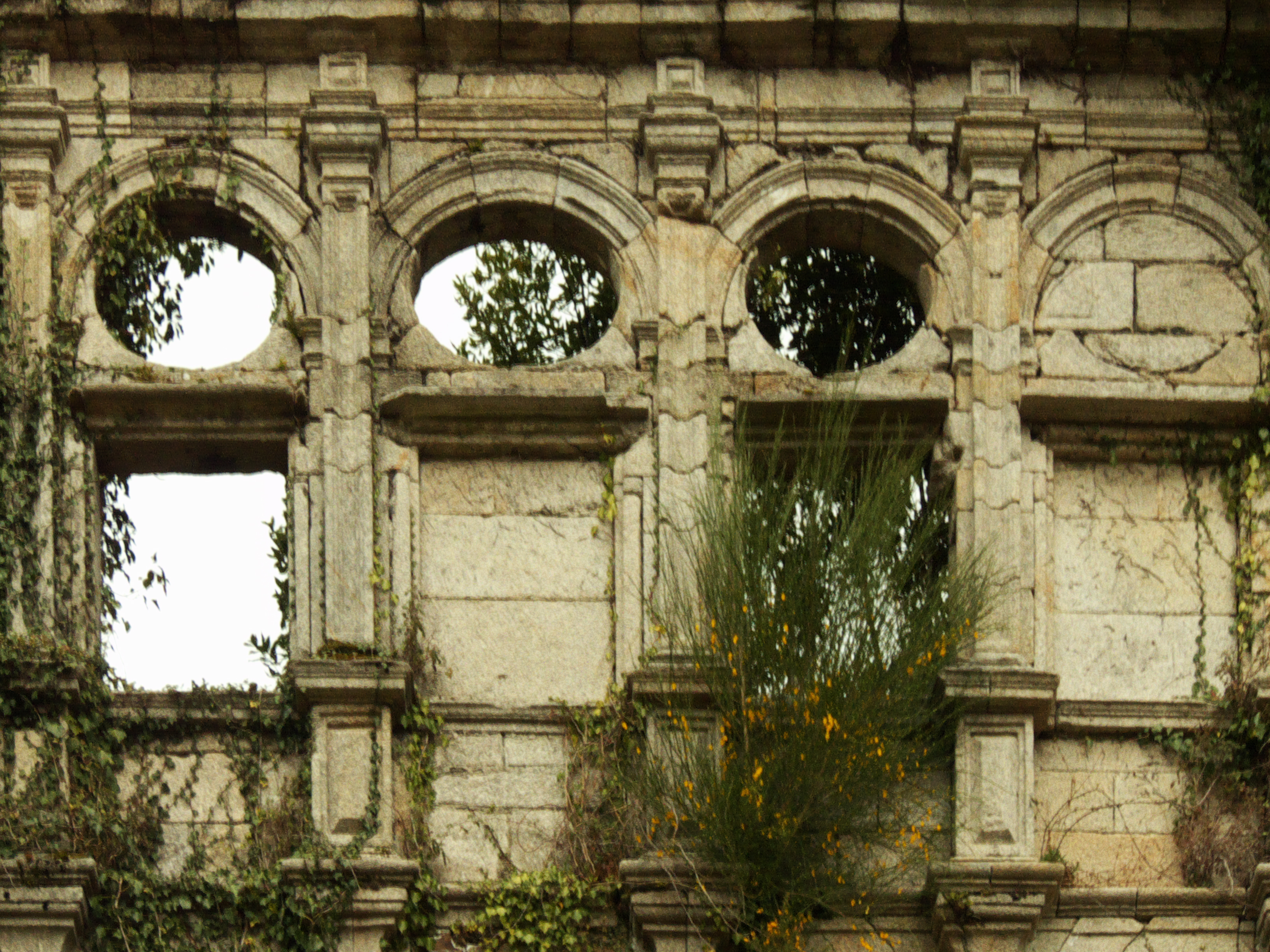 Claustro do mosteiro, Santa Xiá de Monfero, Monfero